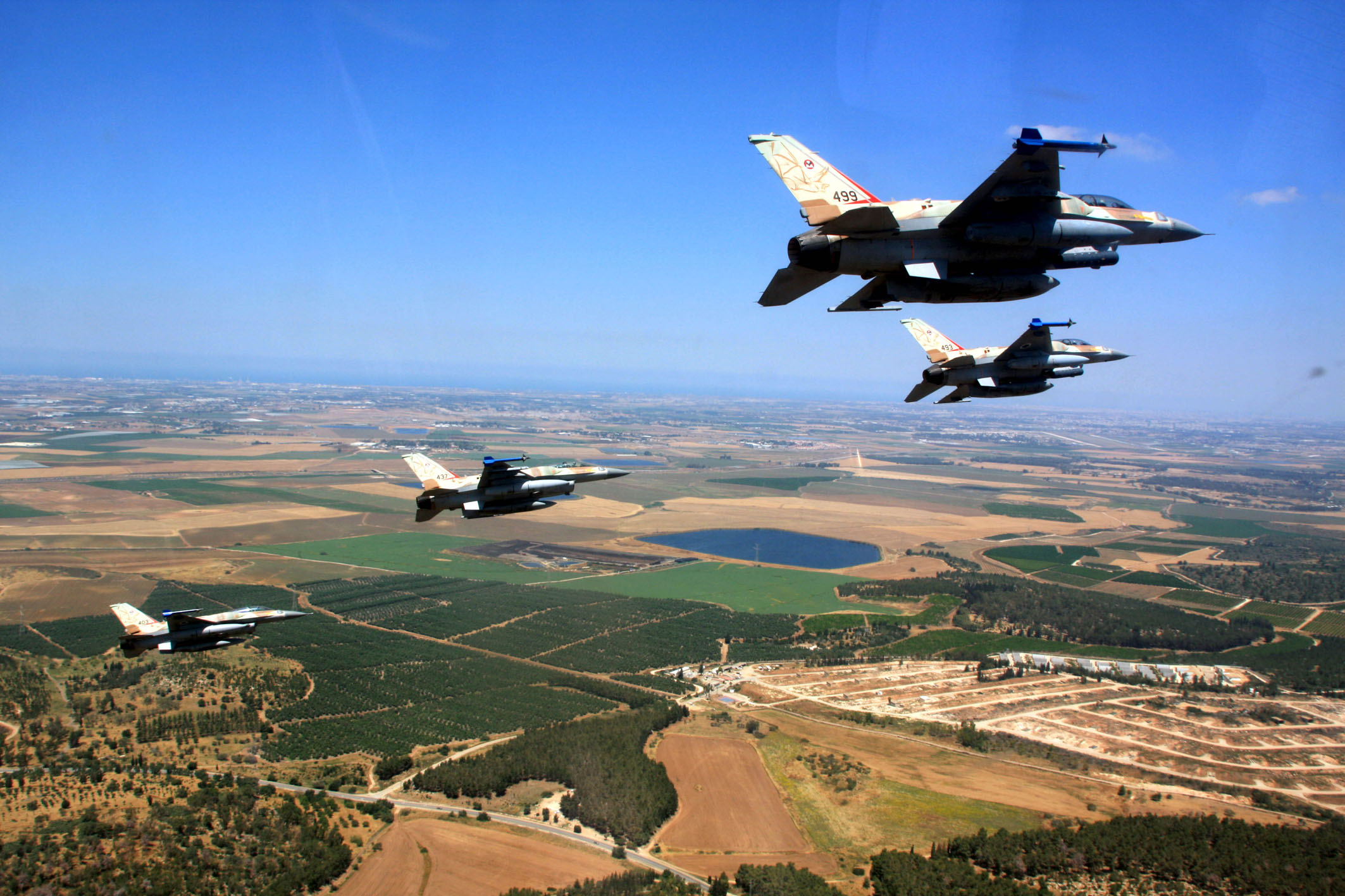 May 10, 2011. The Israeli Air Force crosses all of Israel from north to south, in honor of the country's 63rd Independence Day. Pictured: "Sufa" planes, also known as F-16I, flying in formation. היום ה' באייר תשע"א נערך מטס ההצדעה המסורתי של חיל האוויר בשמי הארץ, לרגל יום העצמאות ה- 63 למדינת ישראל. בתמונות ניתן לראות את מטוסי ה"סופה", F16I, אשר טסים במבנים שונים.